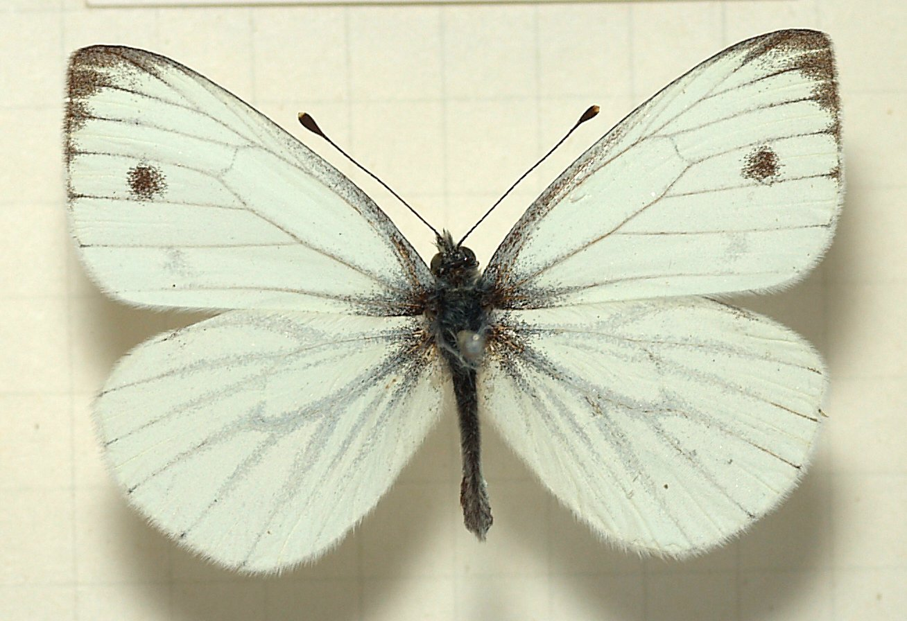 Pieris napi